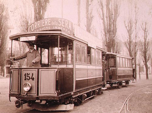 Tram tipo Edison di Milano